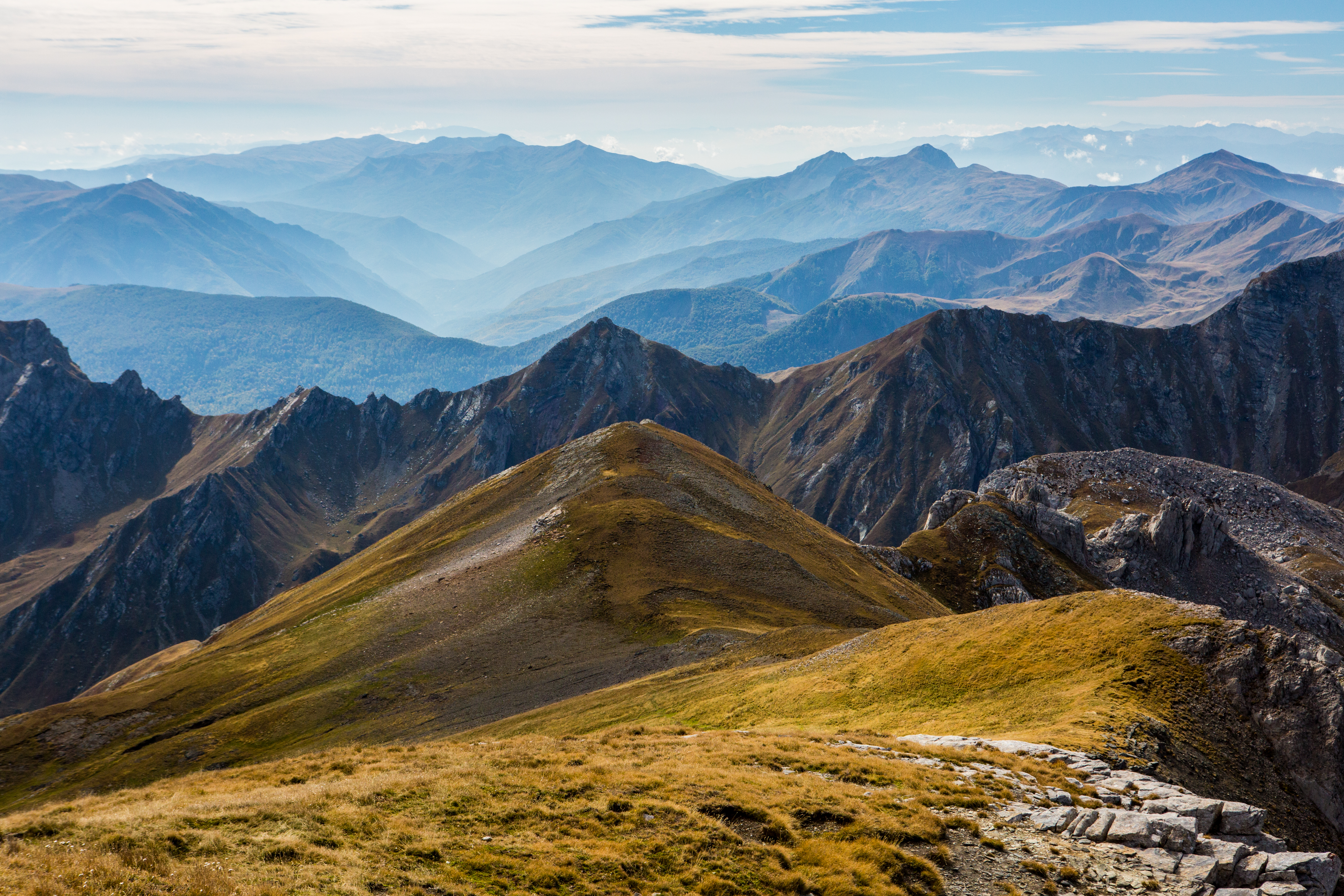 Korab-Koritnik, Diber, Kukes